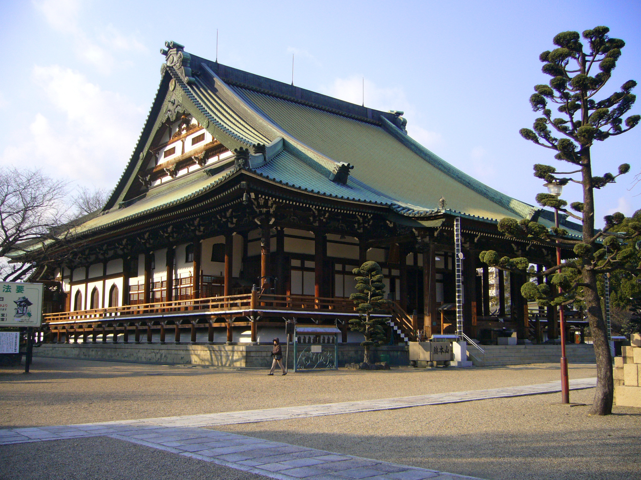 Dai-nenbutsu-ji in Osaka, Japan